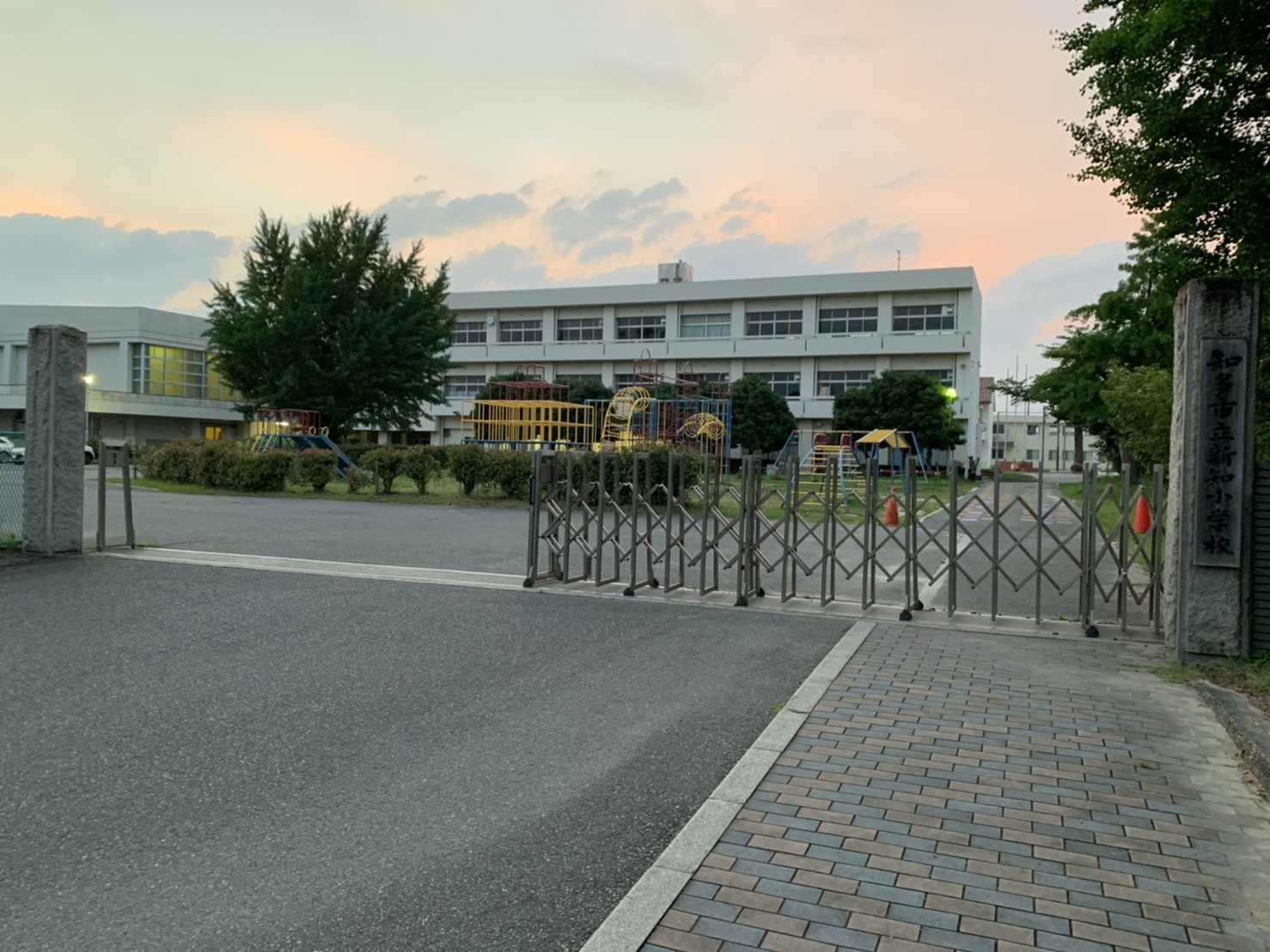 知多市立新知小学校の外観